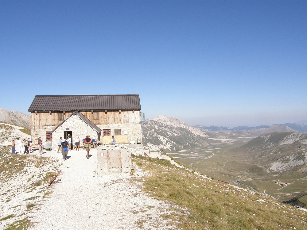 Campo Imperatore